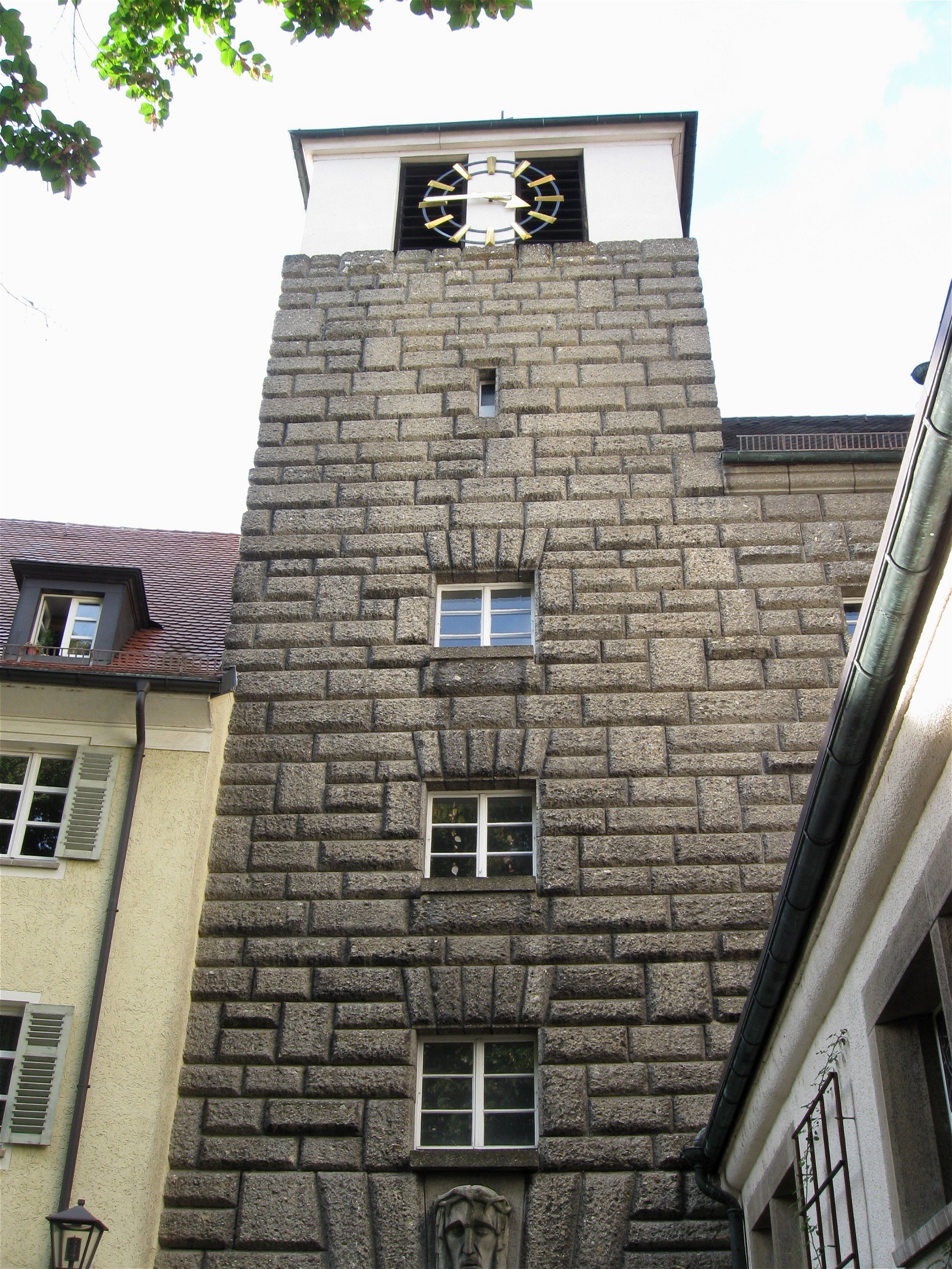 Kreuzgasse 20; Kath. Pfarrkirche Herz Jesu, dreischiffige Basilika mit Satteldach, eingezogenem Chor mit Walmdach und unvollendetem Südturm, verputzter Ziegelbau, Turm mit Hausteinverkleidung, spätexpressionistisch, 1928-30 von Carl Schad; mit Ausstattung